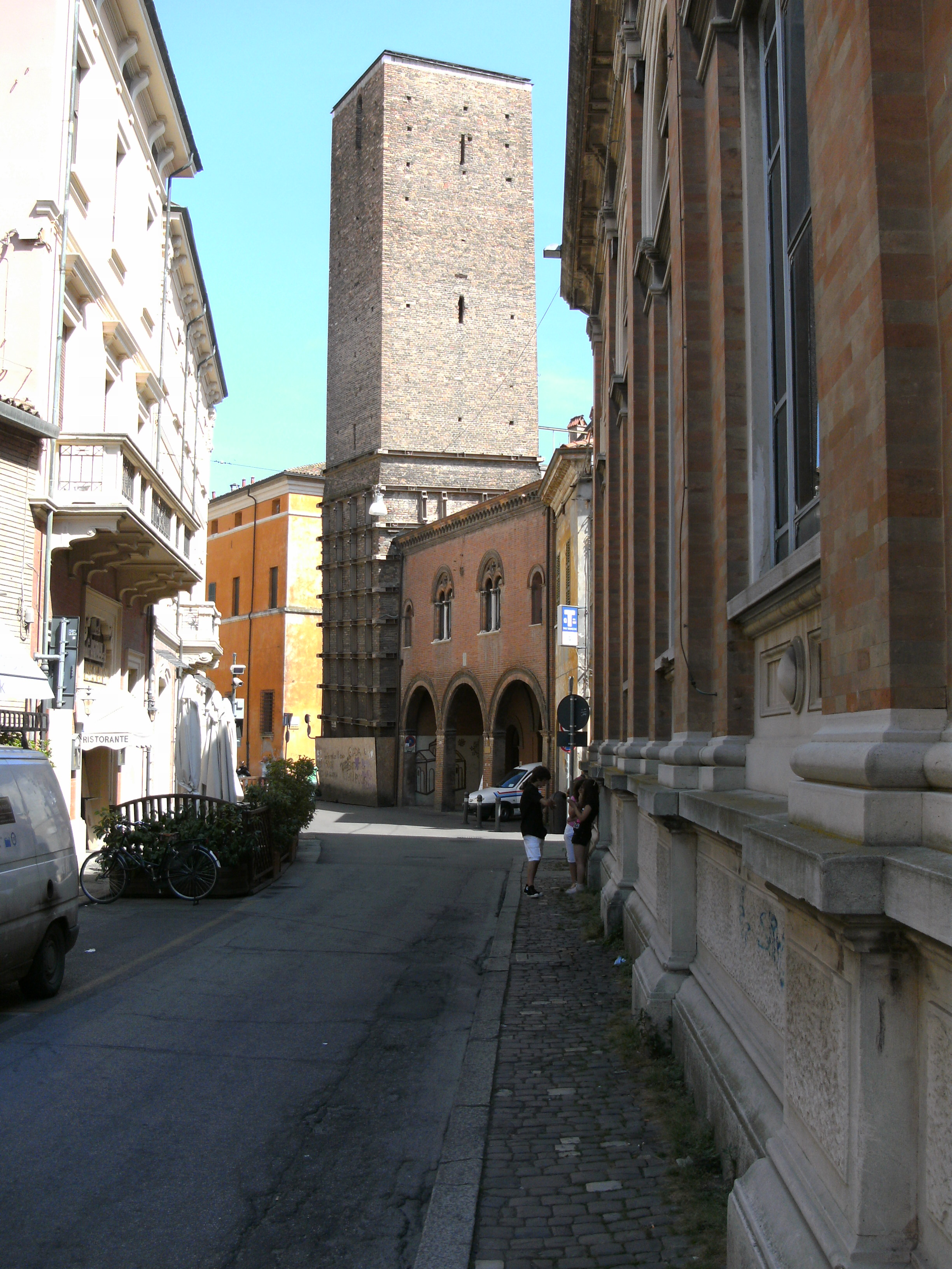 Ravenna, Stadtturm (schief)